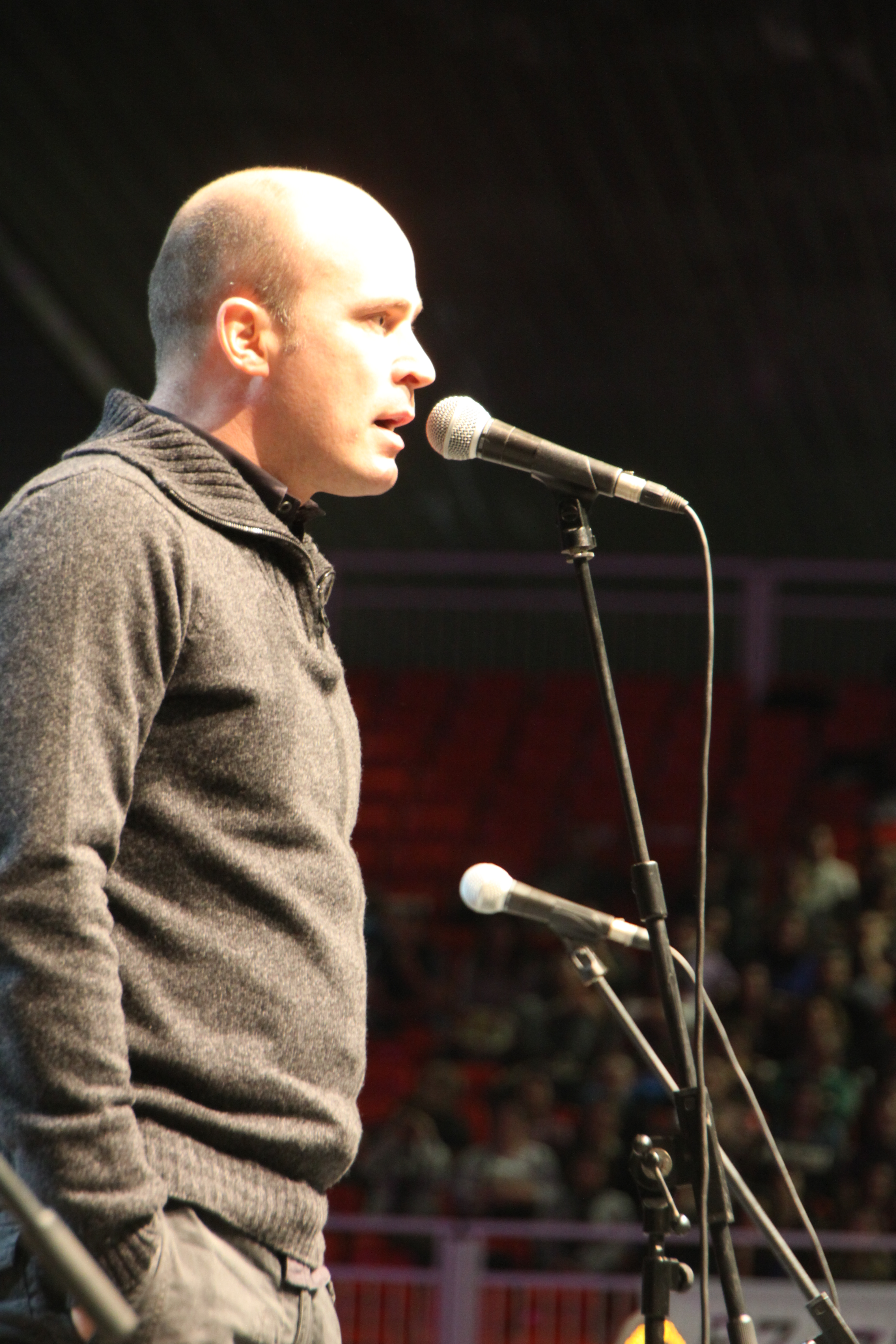 2013ko abenduaren 15ean jokatu zen Barakaldoko BECen Bertsolari Txapelketa Nagusia. Maialen Lujanbio, Aitor Mendiluze, Amets Arzallus, Sustrai Colina, Aitor Sarriegi, Beñat Gaztelumendi, Igor Elortza eta Unai Iturriaga igo ziren oholtzara, 13.500 bertsozaleren aurrean. Bertsolari Txapelketa Nagusia 2017. Egilea: Uribe Kosta eta Erandioko agerkaria.